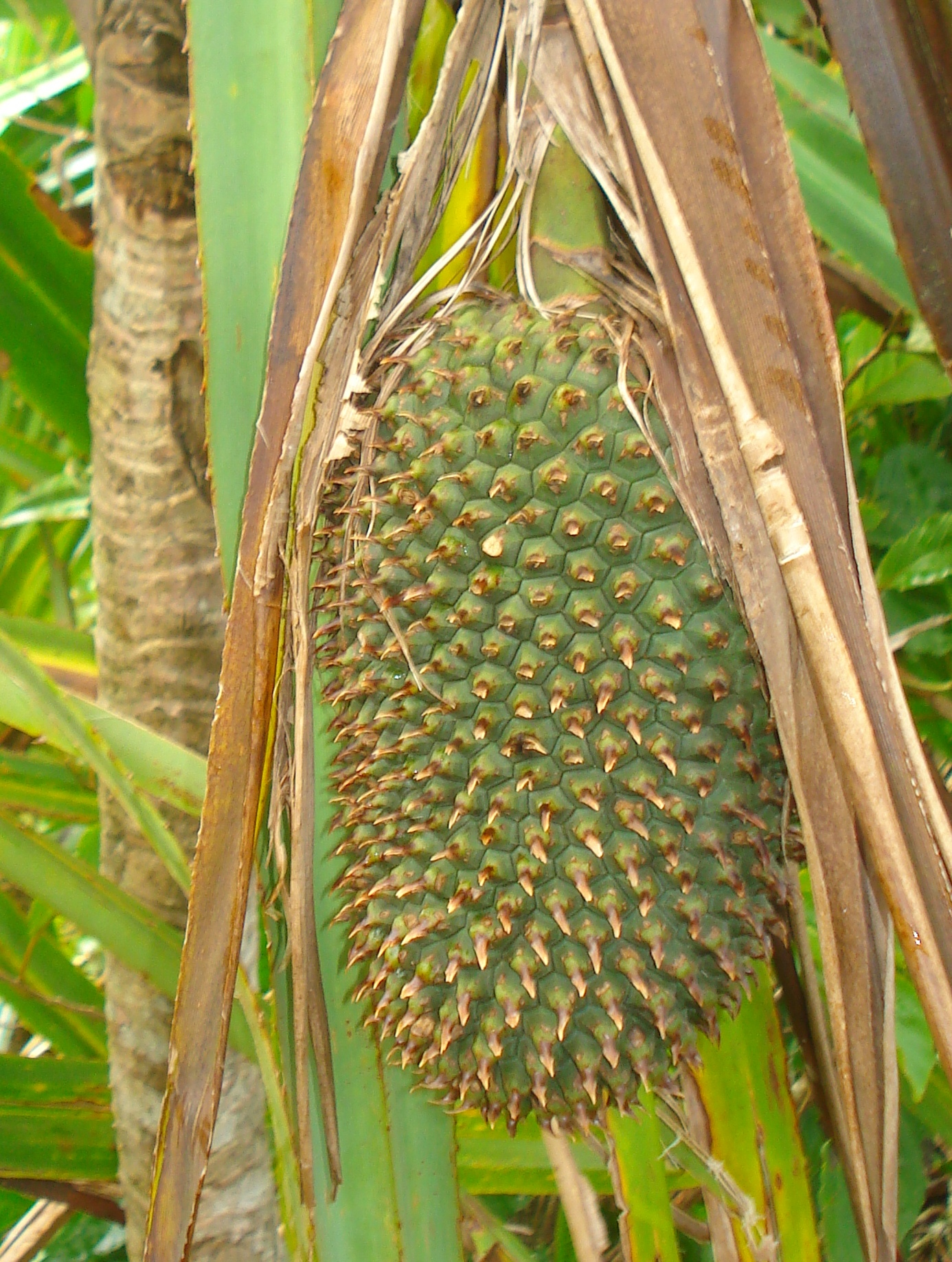 പായ് നെയ്യുന്നതിനുള്ള കൈതച്ചെടിയിലുണ്ടാകുന്ന കായ്.